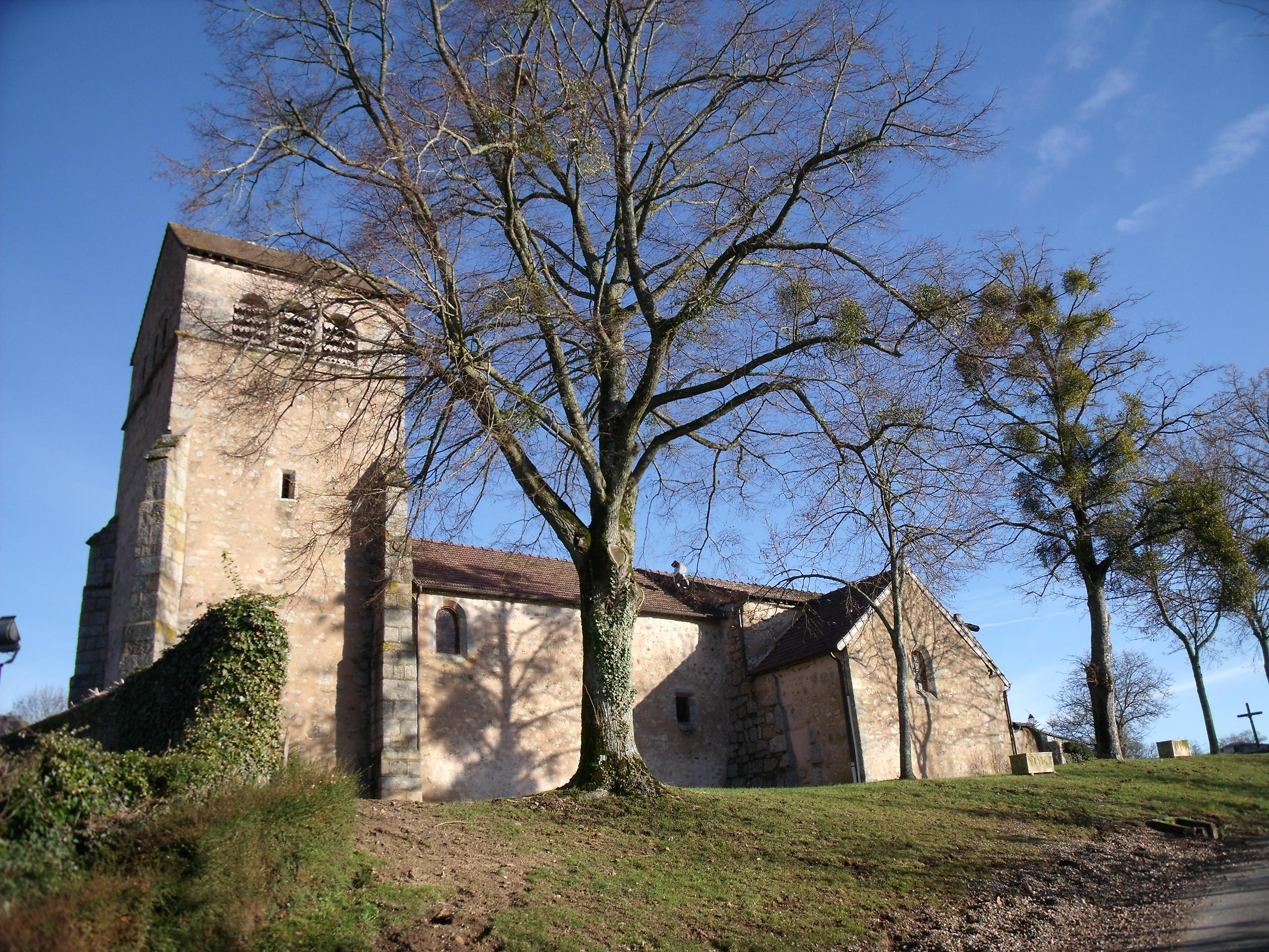 Eglise de Marly-sous-Issy - France - 15 Janvier 2011